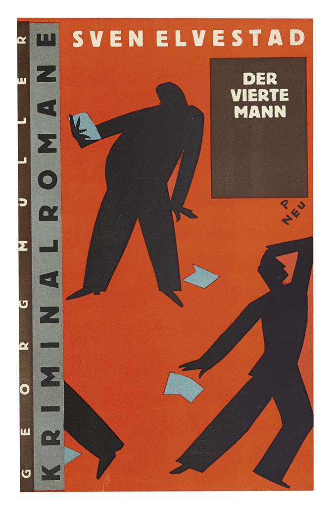 Sven Elvestad: Der vierte Mann. Kriminalroman. München, Georg Müller Verlag, ohne Jahr (c. 1925) (Georg Müller Kriminalromane)